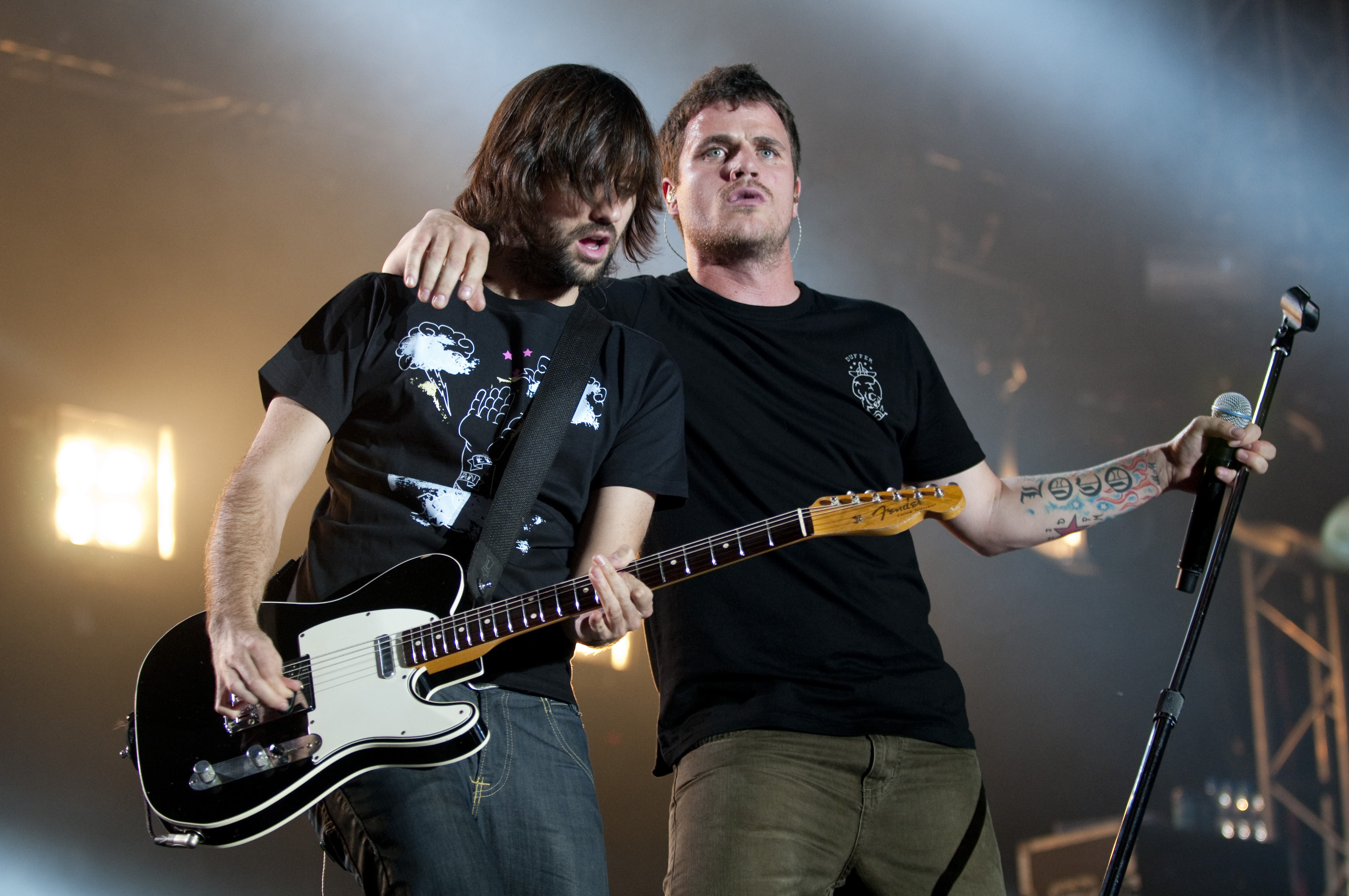 El Canto del Loco